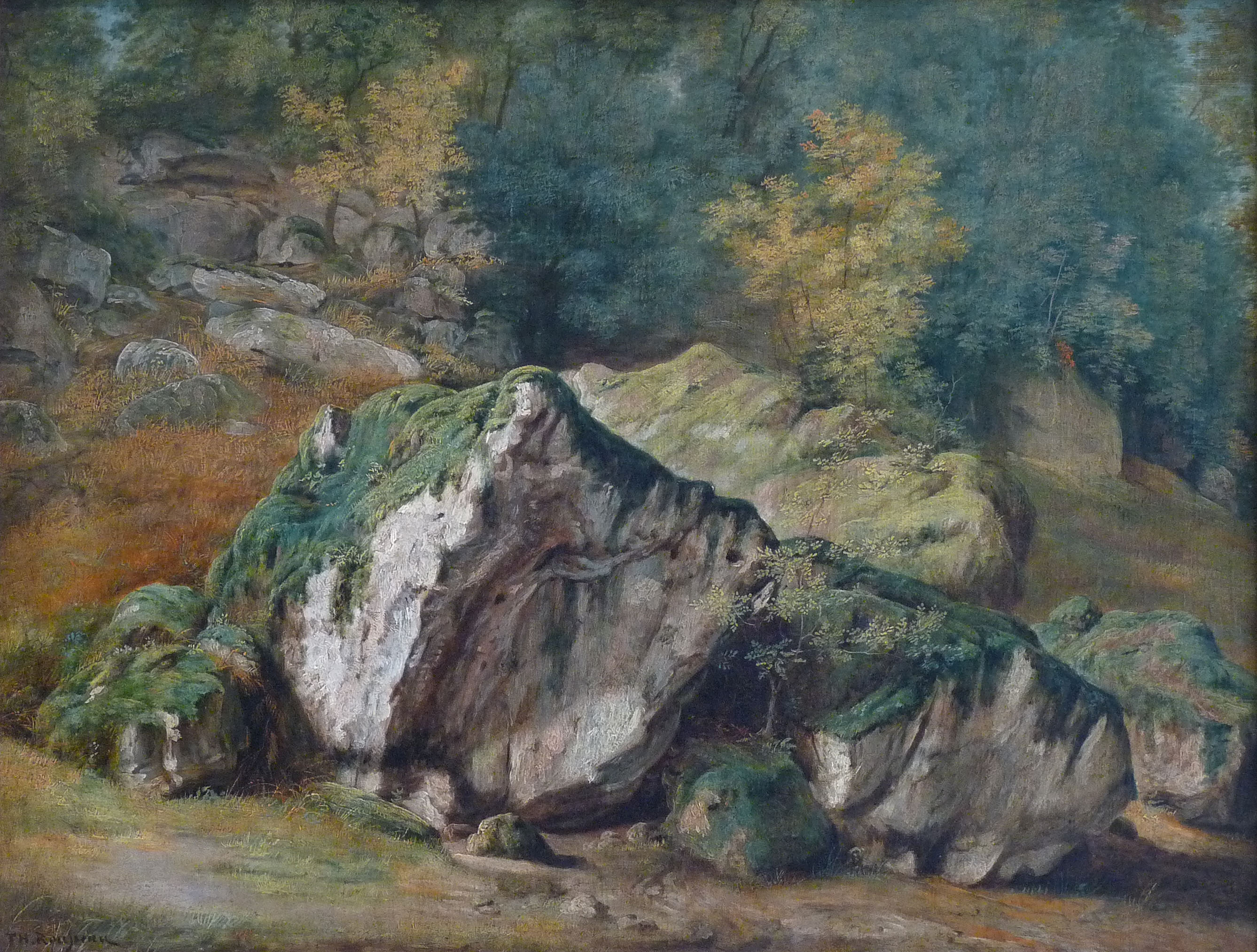 Théodore Rousseau : Étude de rochers et d'arbres (1829), huile sur toile, 53 x 70, musée des Beaux-Arts de Strasbourg